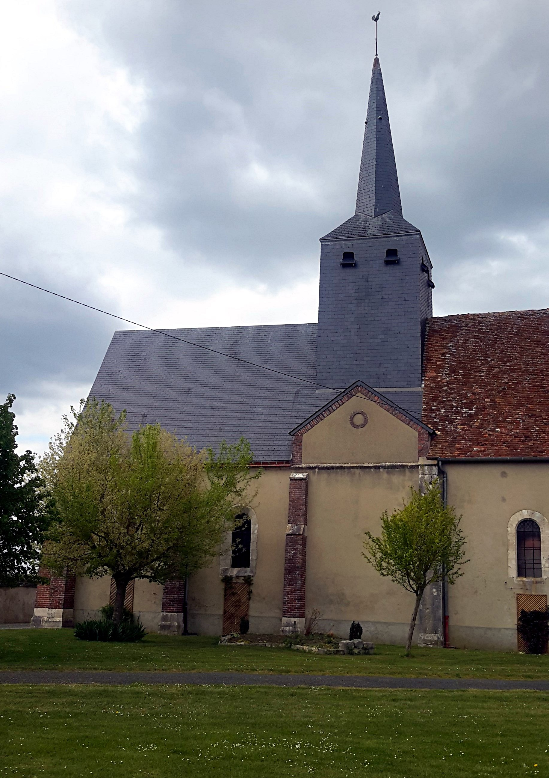 Église de la Sainte Trinité, Mignerette, Loiret, France.